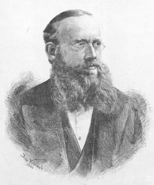 Ludvík Šimek (1837 - 1886), český sochař. Portrét, nakreslený Janem Vilímkem pro Humoristické listy